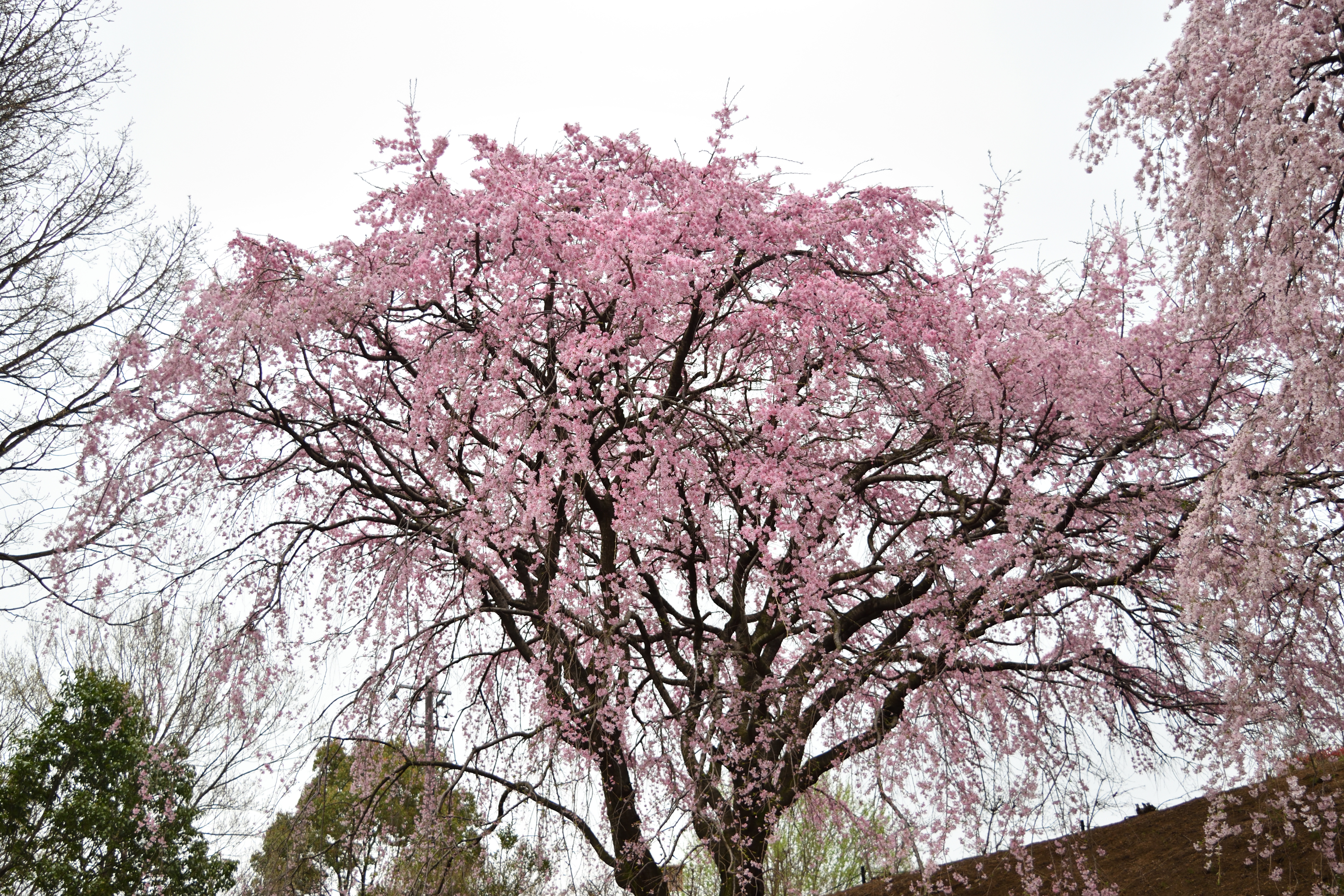 香川県園芸総合センターにある三春の滝桜の子孫樹。平成元年に植樹